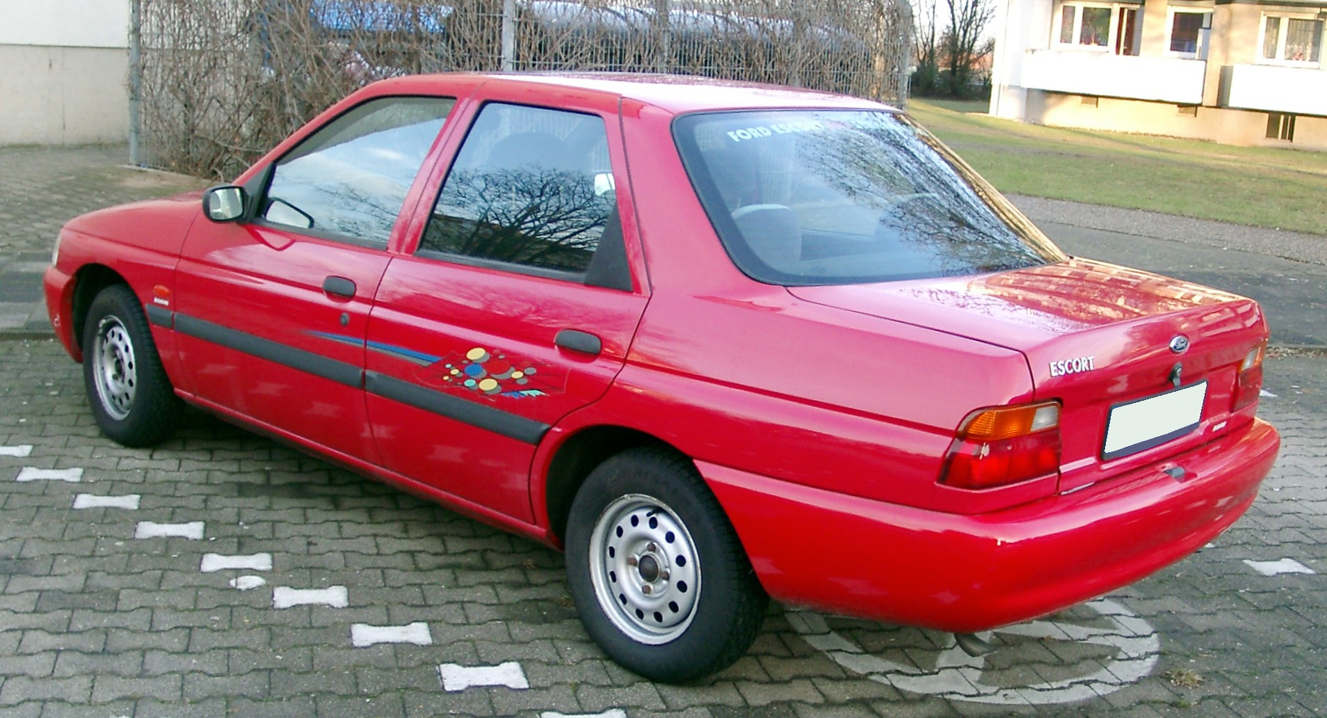 Ford Escort Mk7 Stufenheck